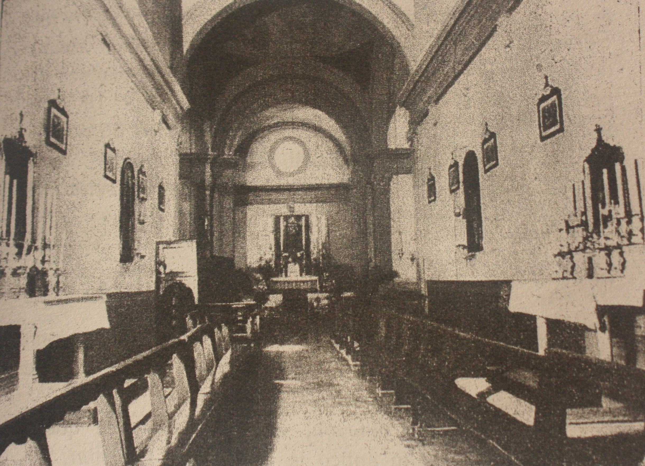 Interno della Chiesa di San Quirico a Legnaia negli anni Trenta, foto in bianco e nero